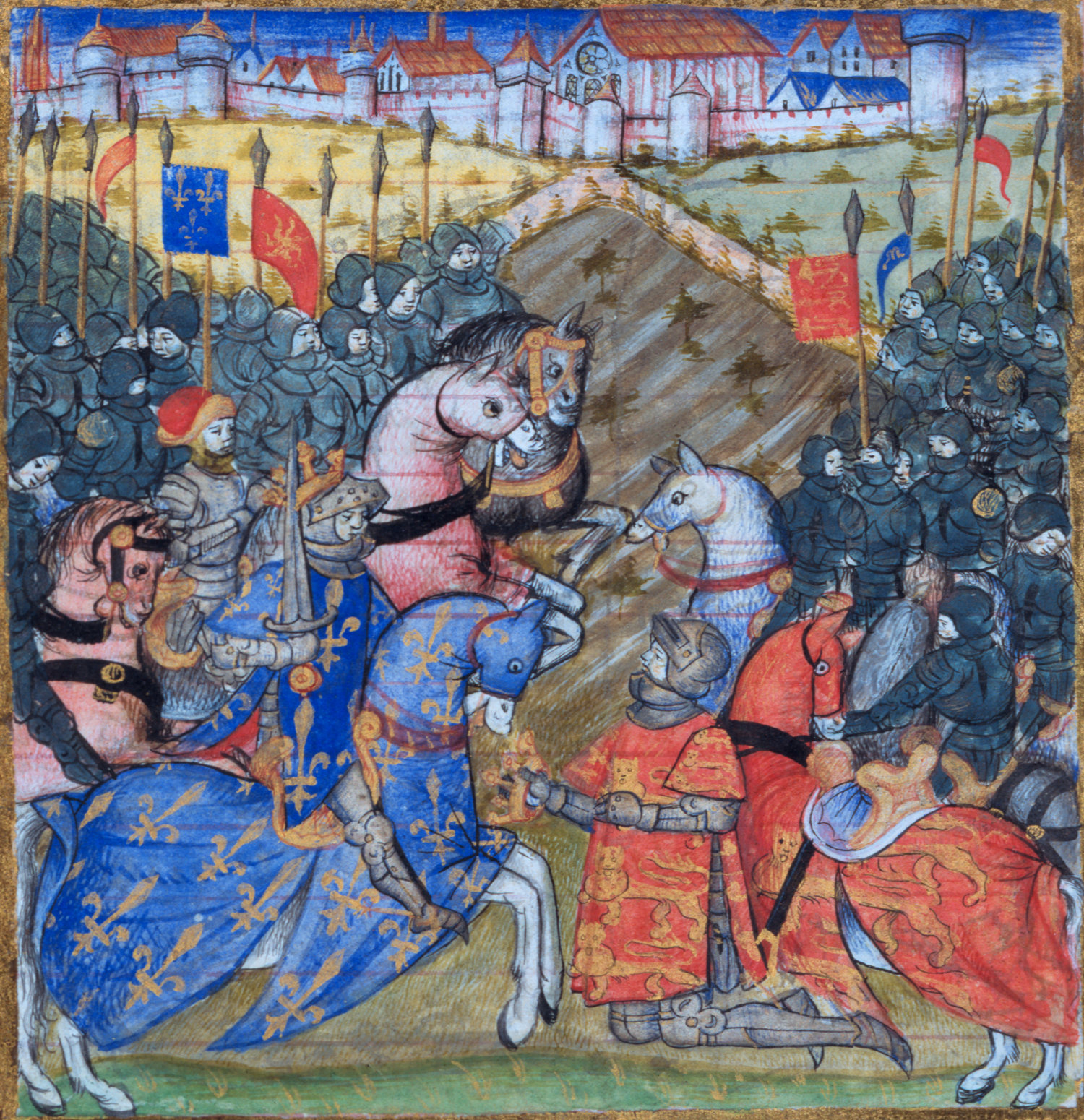 Hommage de Richard Coeur de Lion à Philippe Auguste (Berry, 1195)